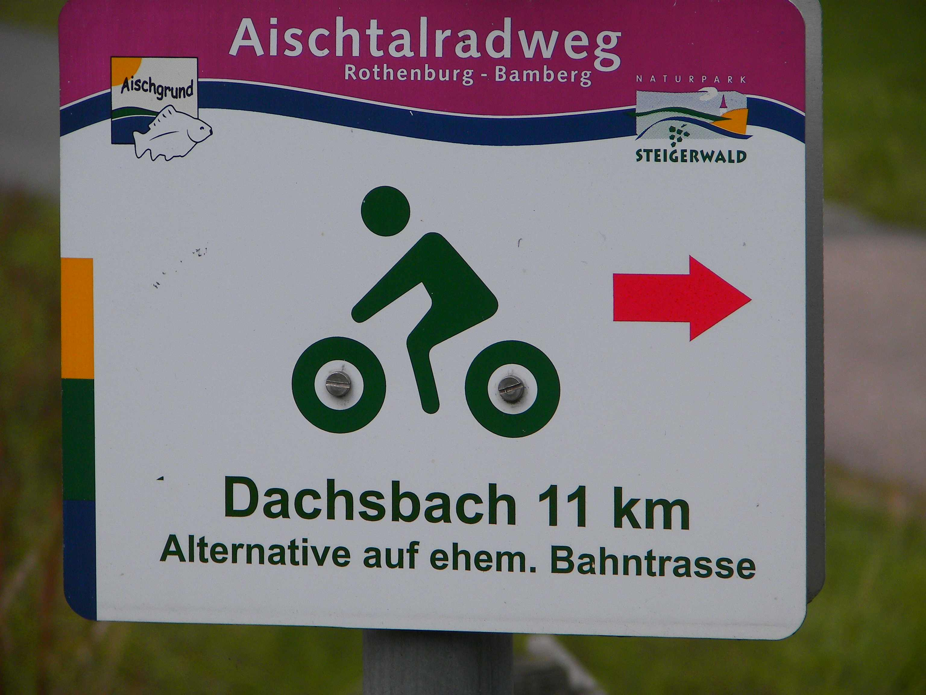 Aischtal-Radweg, Hinweisschild